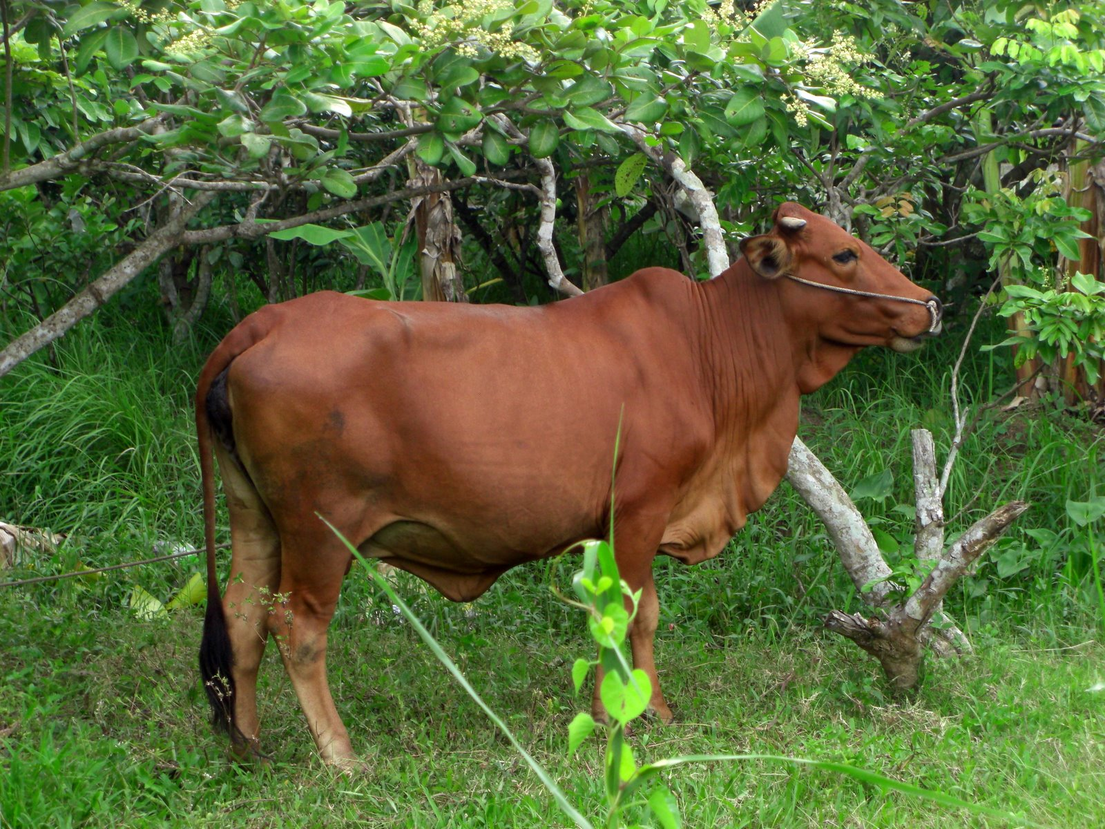 Buffalo in Vietnam